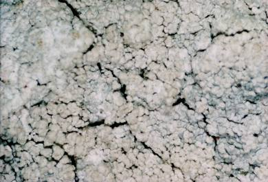 Lepraria lobificans